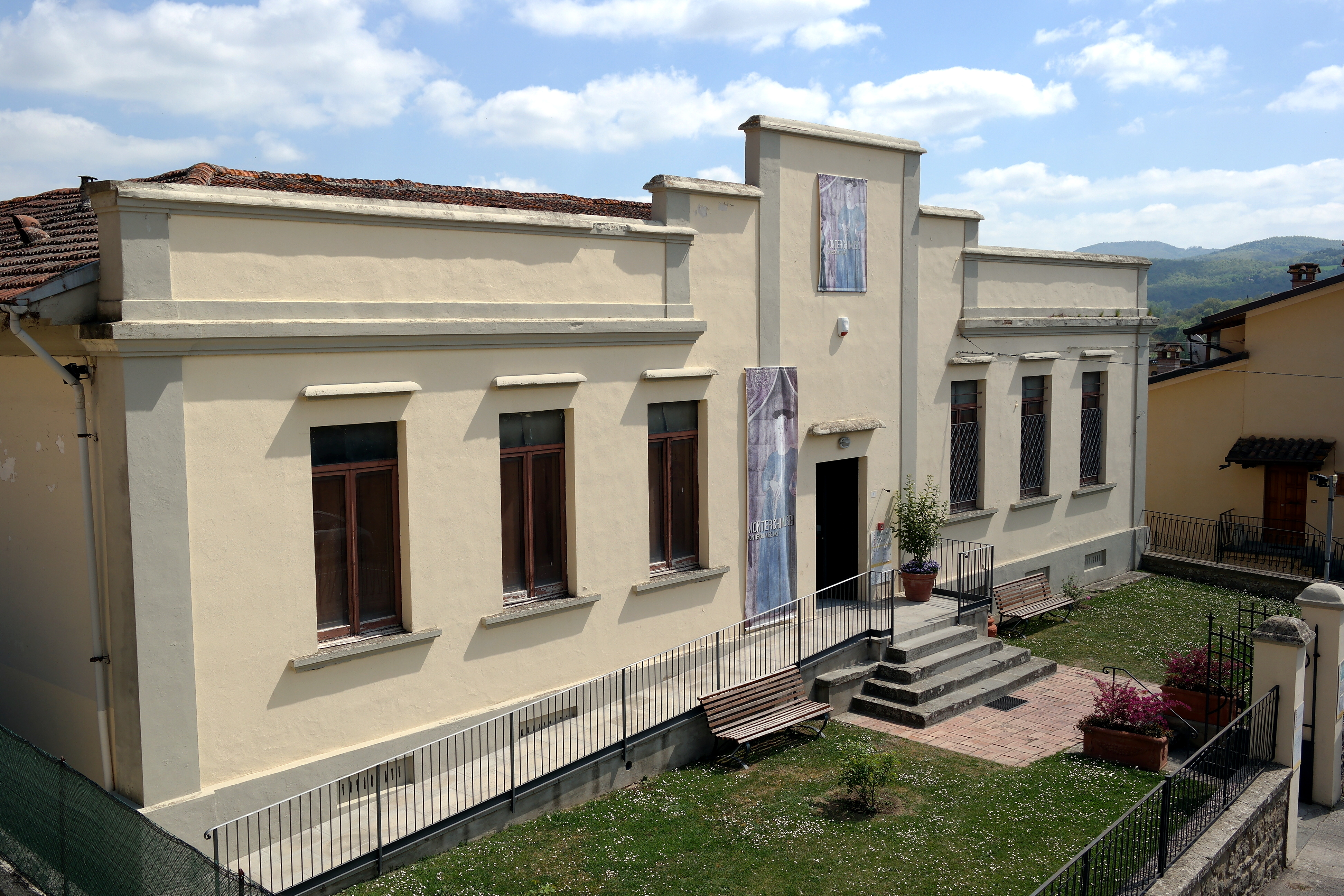 Museo della Madonna del parto a Monterchi